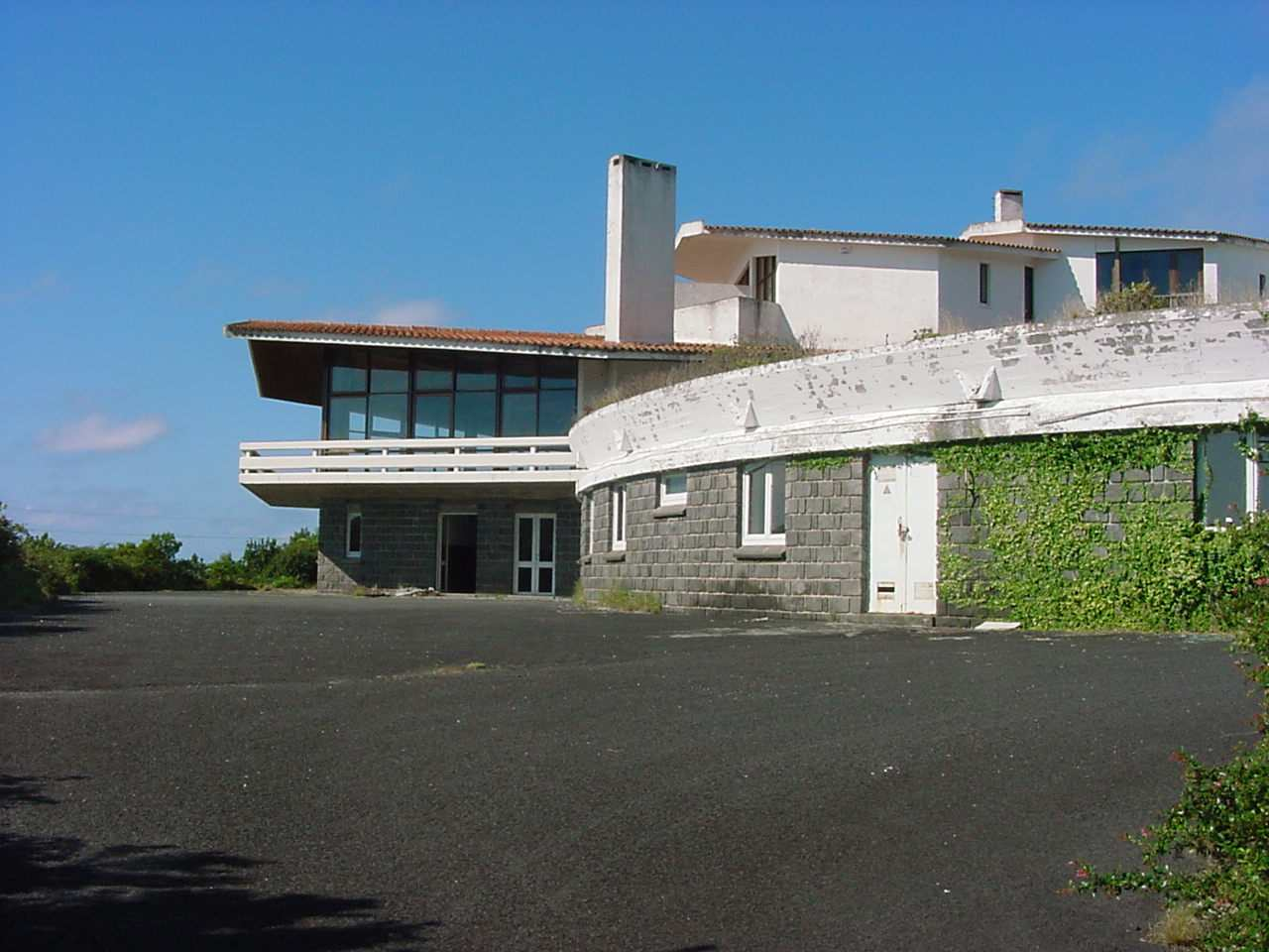 Estalagem da Serreta, Angra do Heroísmo, ilha Terceira, Açores, Portugal.